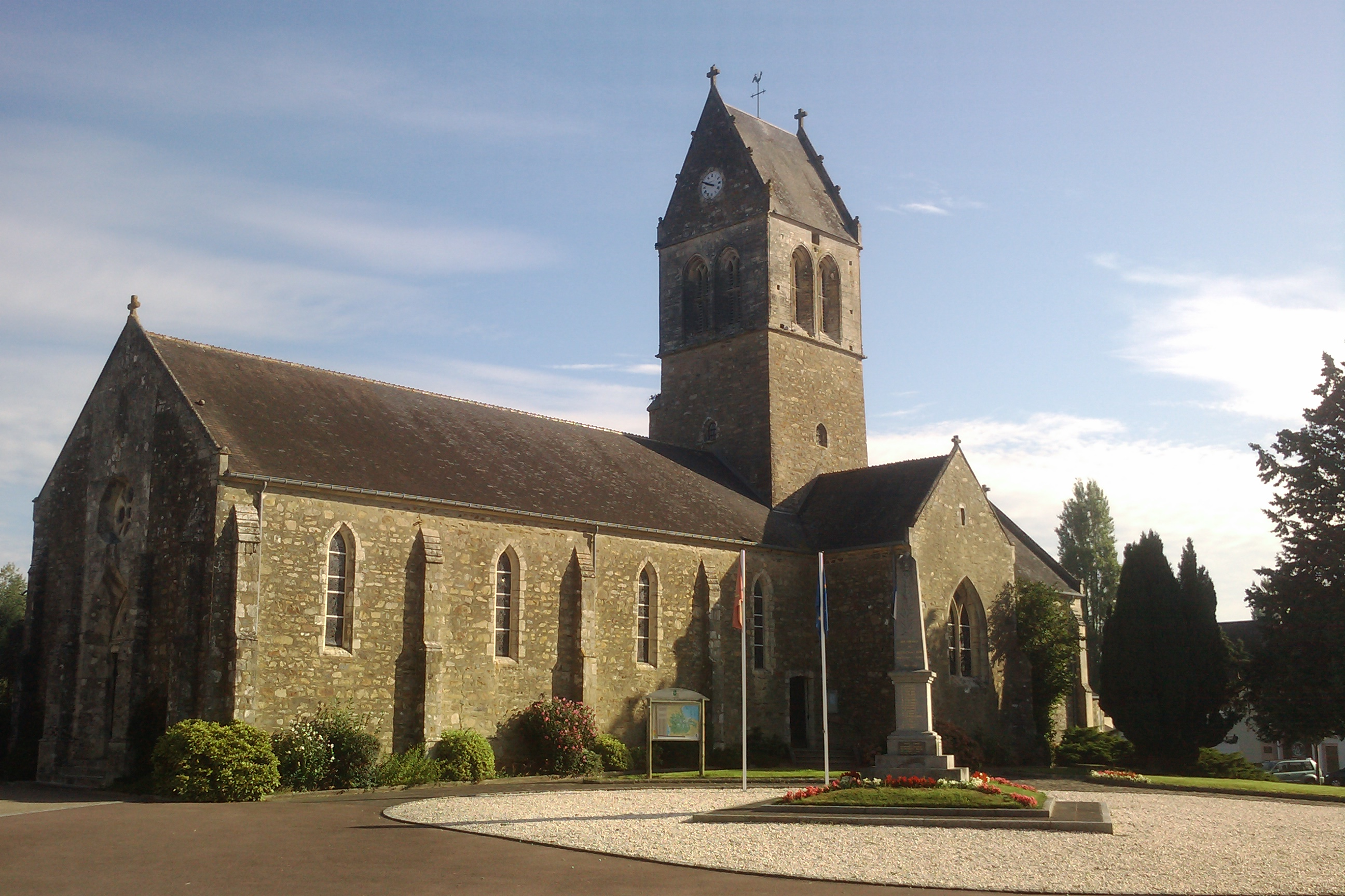 Église de Remilly-sur-Lozon